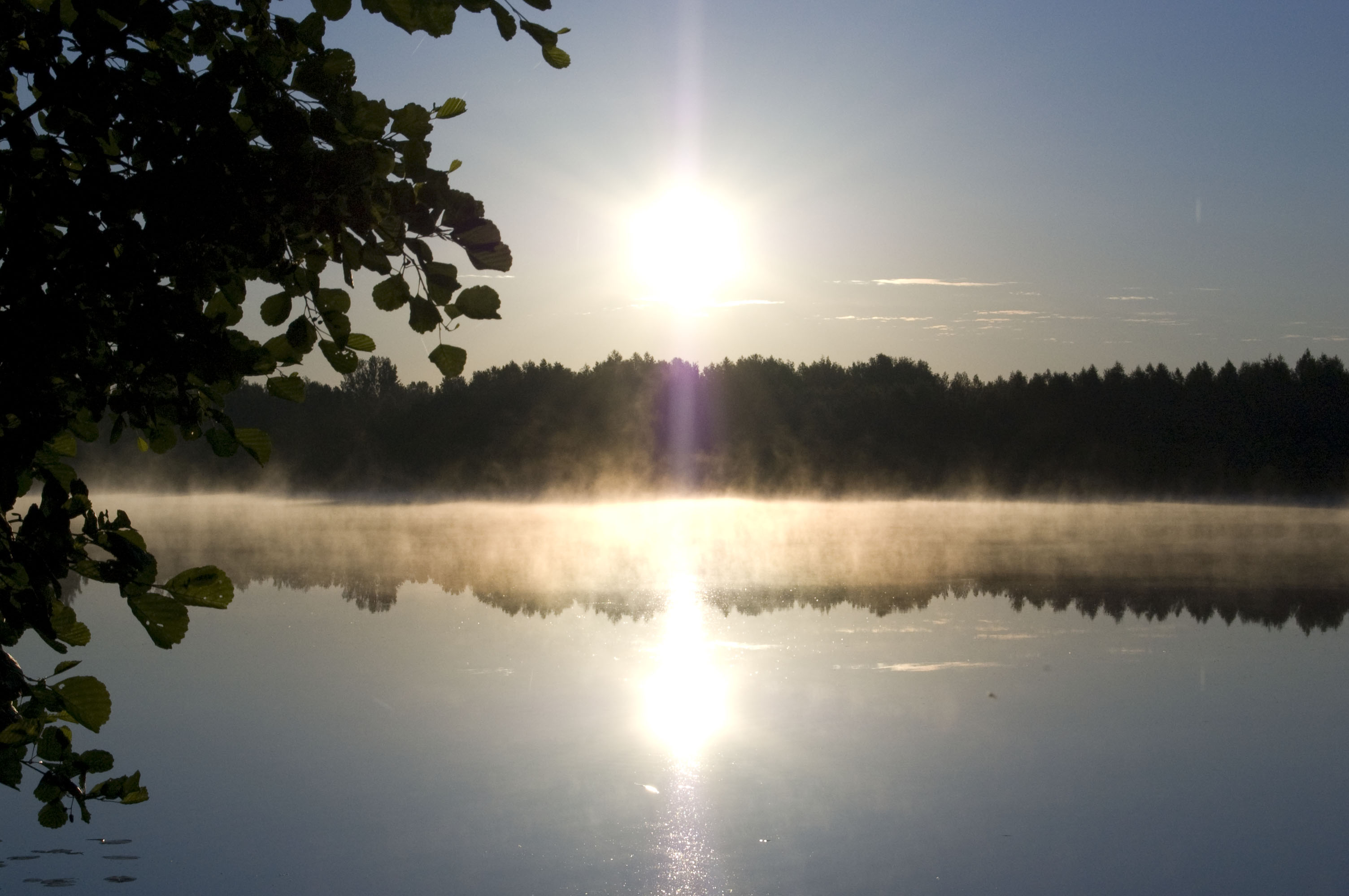 Foto de aŭroro super lago Svetlojar